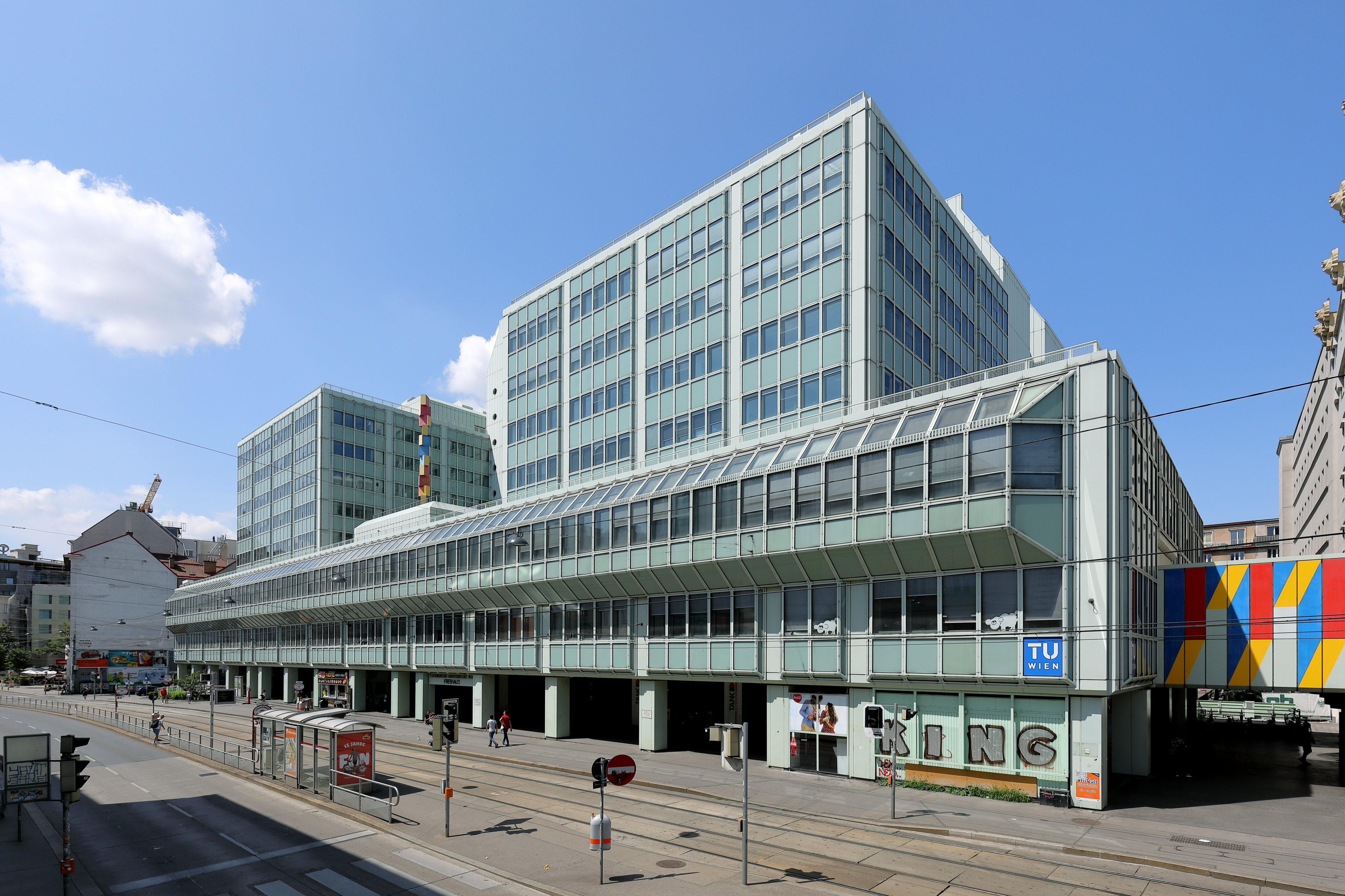 Das Institutsgebäude „Freihaus“ der Technischen Universität an der Adresse Wiedner Hauptstraße 8-10 im 4. Wiener Bezirk Wieden. Der Baukomplex mit 3 Türmen wurde ab 1976 nach den Plänen der Architekten Alexander Marchart und Roland Moebius errichtet. Die Dachgleiche fand 1979 statt, jedoch der Bezug verschob sich, weil „die hochwertige Haustechnik den Gebäudekomplex fast überforderte. Im Zuge von Nachplanungen wurde die Raumhöhe schließlich von 3 m auf 2,70 m bis sogar 2,50 m gesenkt und Behördenauflagen erzwangen eine fast vollständige Neubearbeitung“. Im Anschluss wurde das unmittelbar nördlich situierte Bibliotheksgebäude der TU Wien (ganz rechts im Bild) an der Adresse Wiedner Hauptstraße 6 von den gleichen Architekten errichtet und 1987 eröffnet.